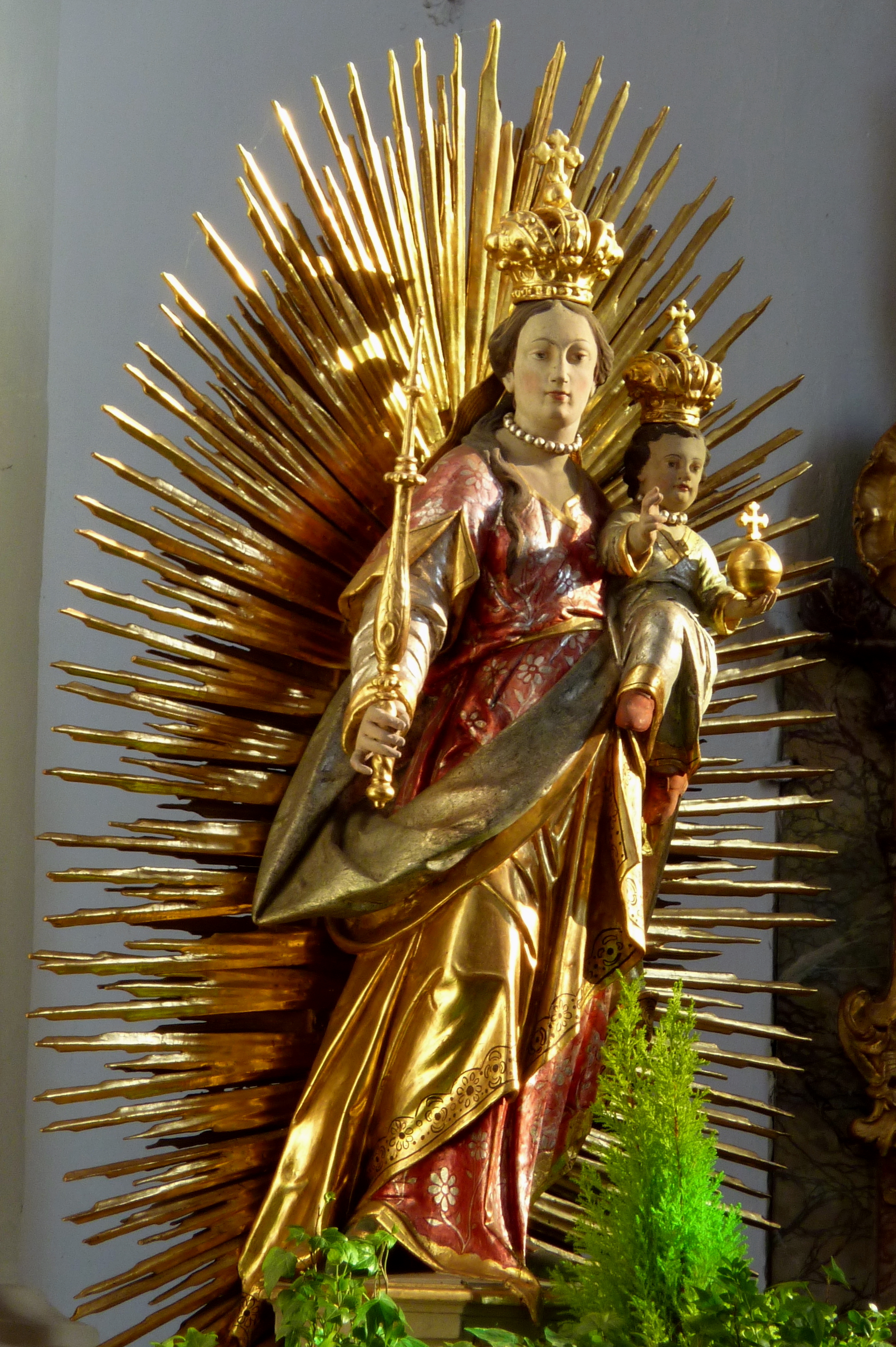 Katholische Pfarrkirche St. Ulrich und Martin in Wittislingen im Landkreis Dillingen an der Donau, Madonna im Strahlenkranz (Mondsichelmadonna), um 1790, der Werkstatt von Johann Michael Fischer (1717-1801) zugeschrieben